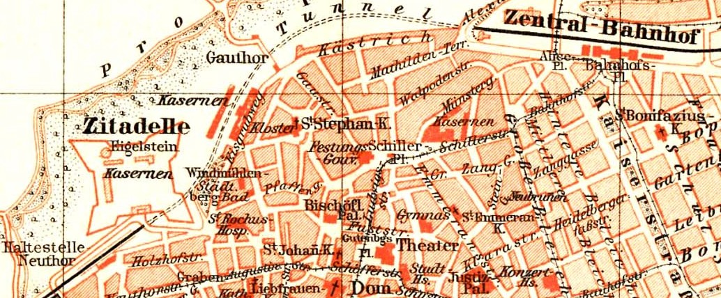 Stadtplan (Umgebung) von Mainz, hier unter anderem Mainzer Eisenbahntunnel (Mainz)